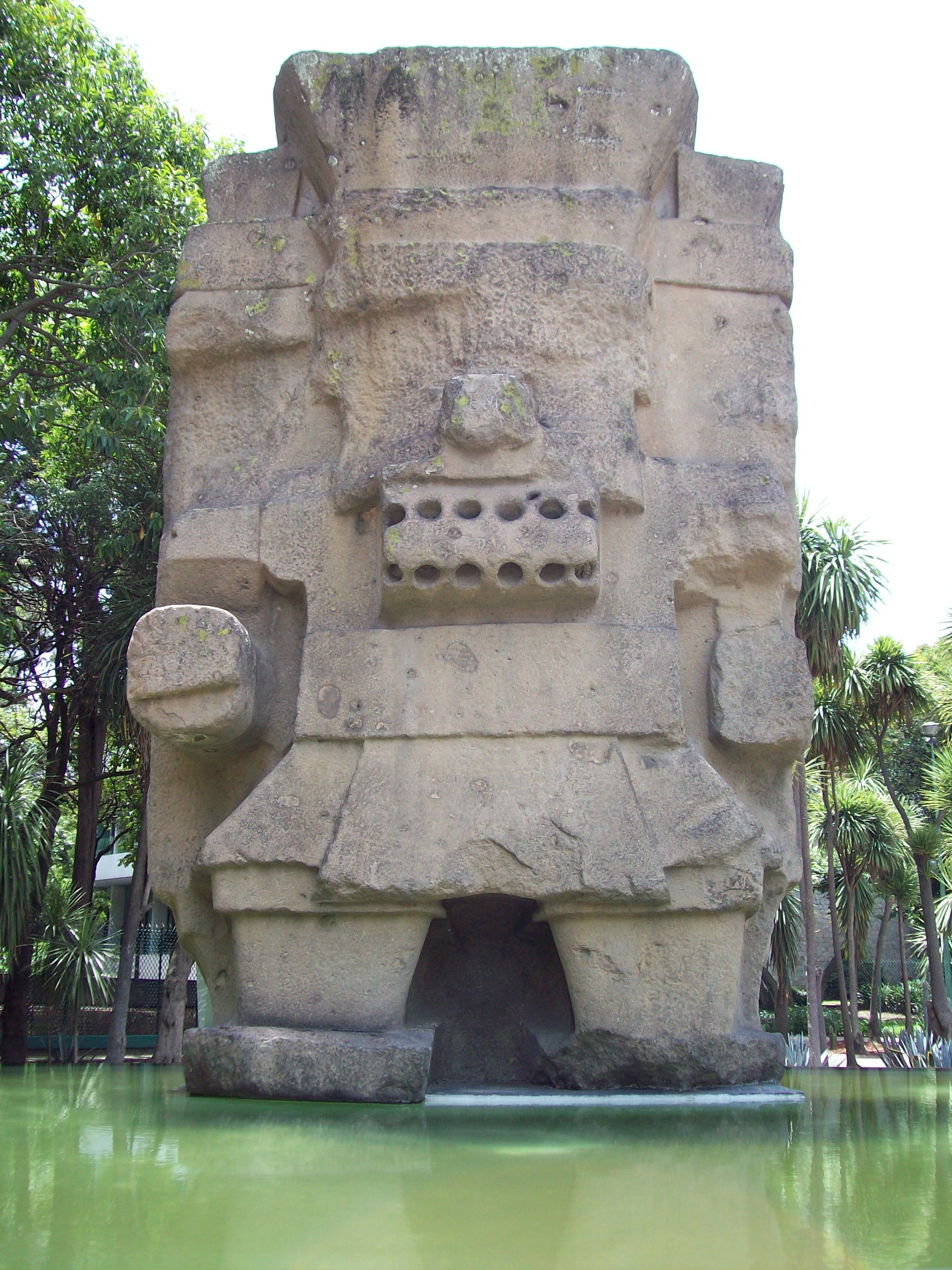 Tlaloc, dios de la lluvia. Museo Nacional de Antropología en la Ciudad de México